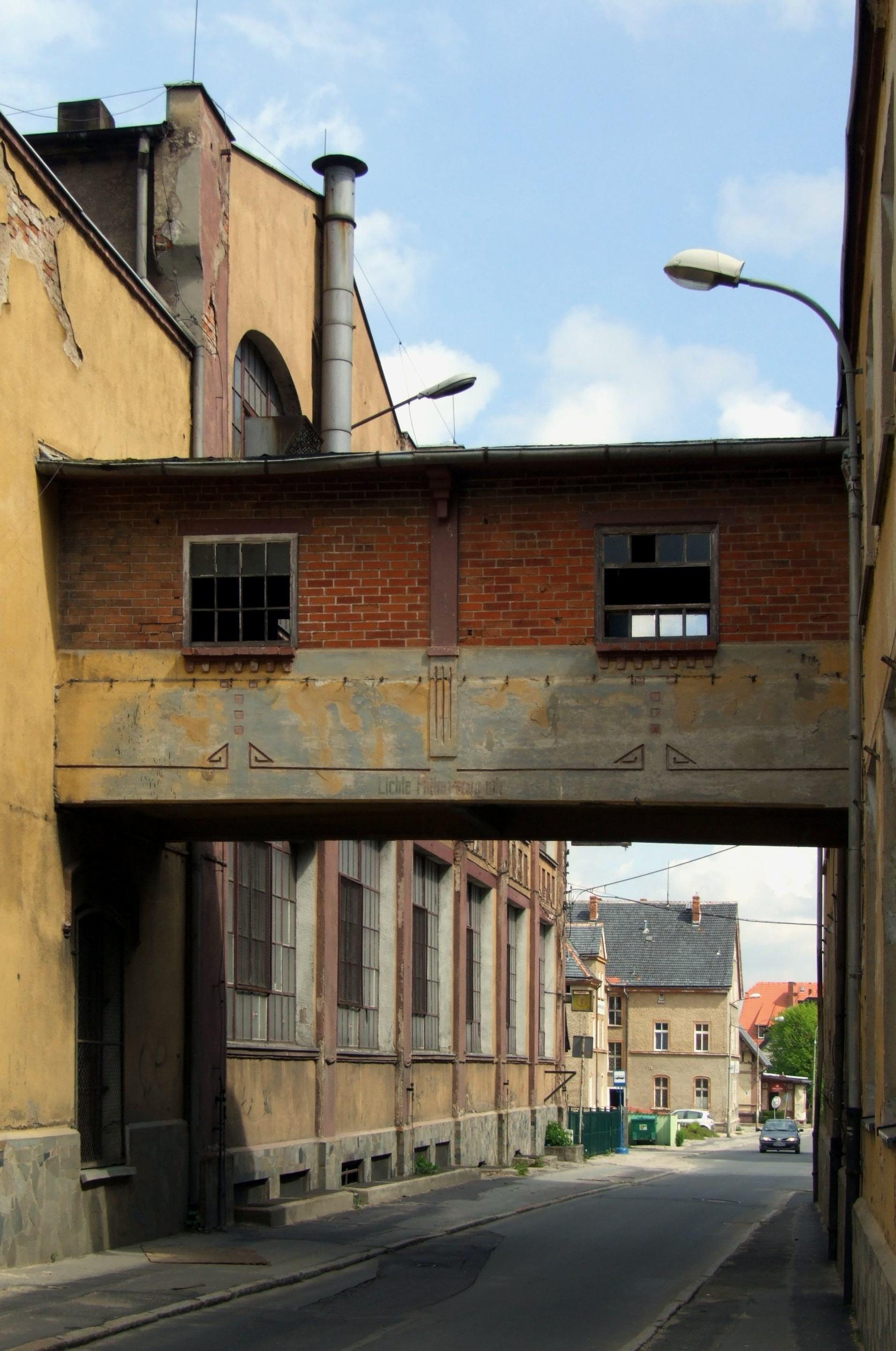 Former factory Christian Dierig AG in Bielawa (Langenbielau)